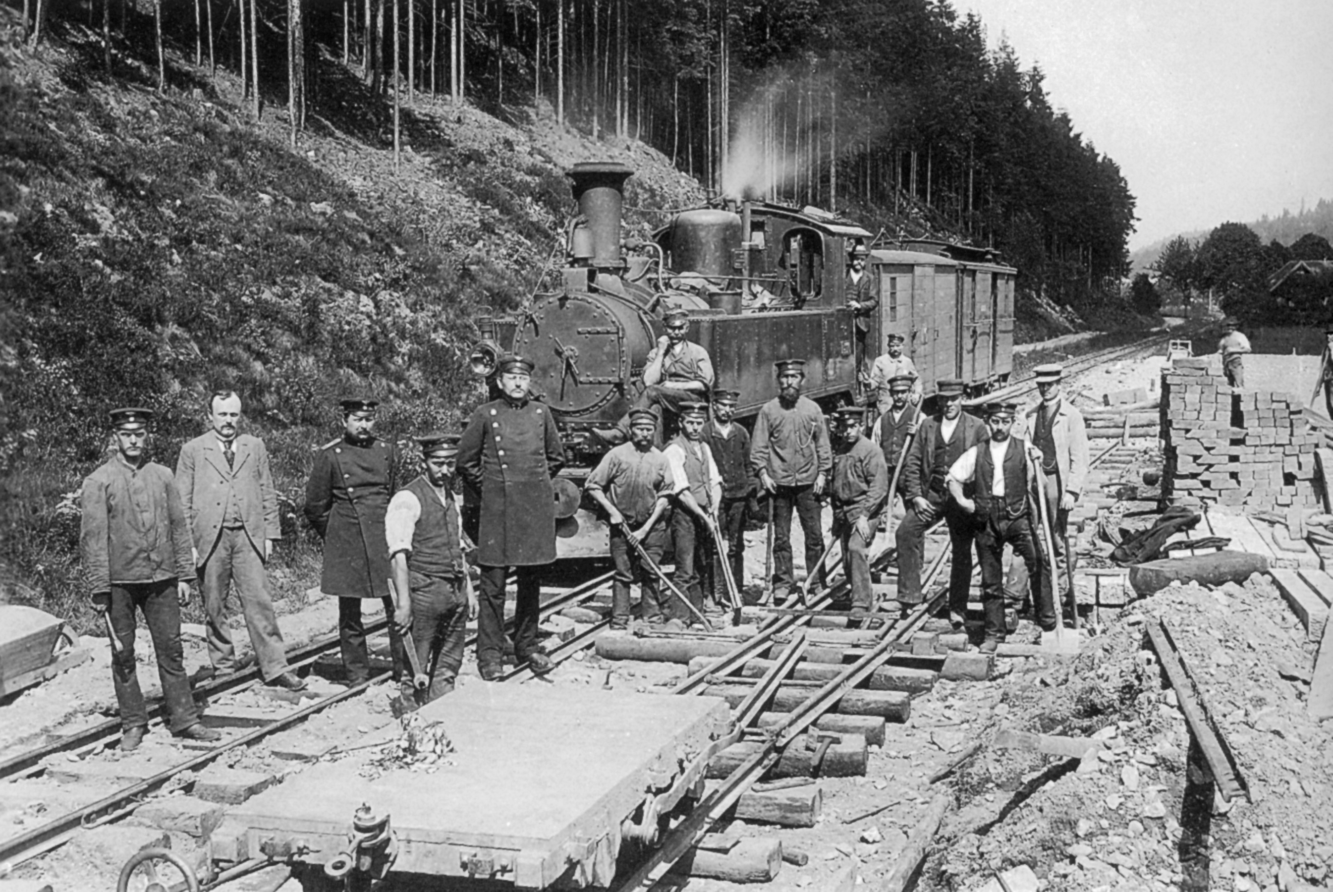 Bauzug mit Lok IV K 110 (DR 99.518) im Bahnhof Buschmühle der Weißeritztalbahn